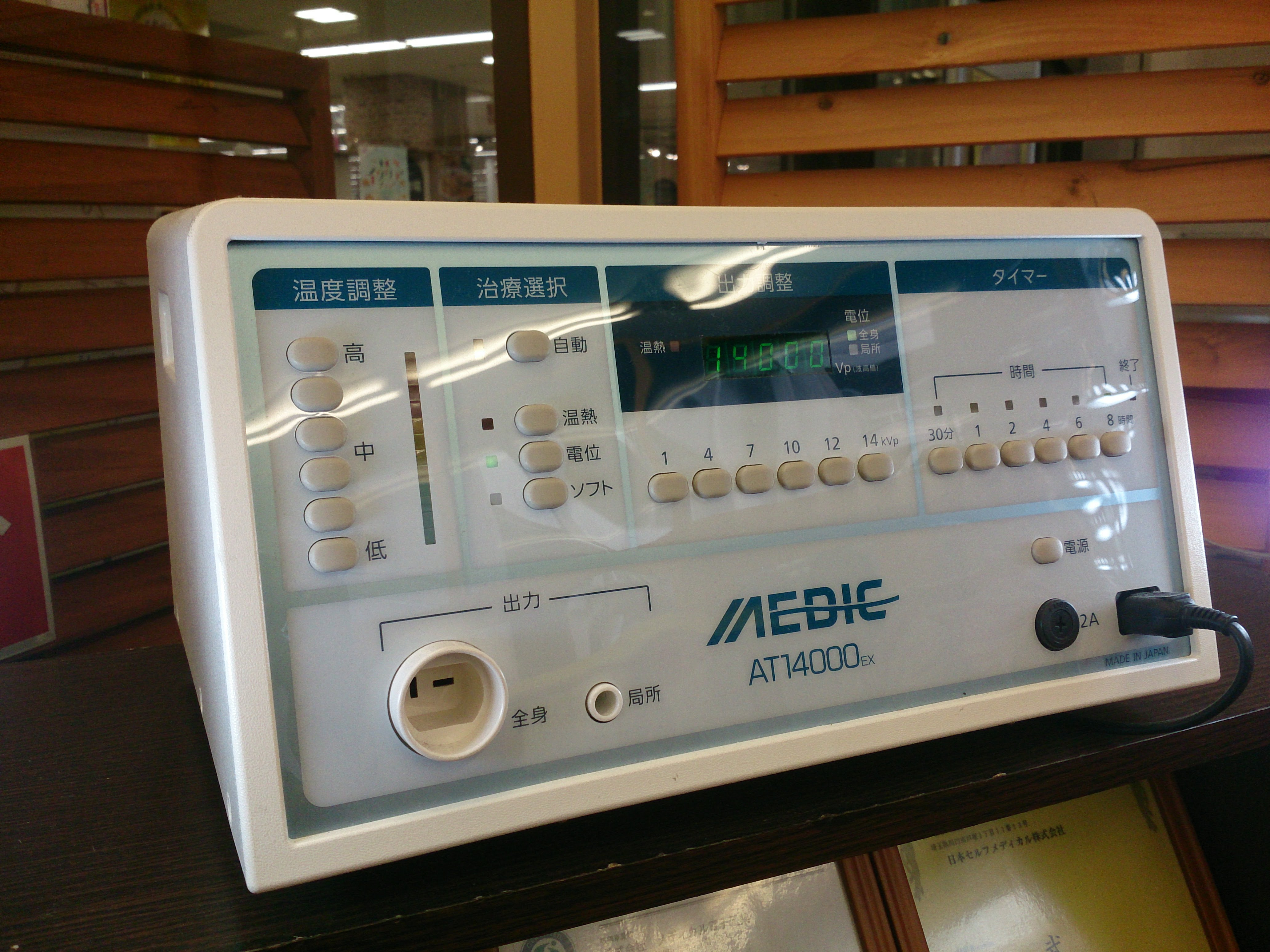 日本セルフメディカル・AT14000